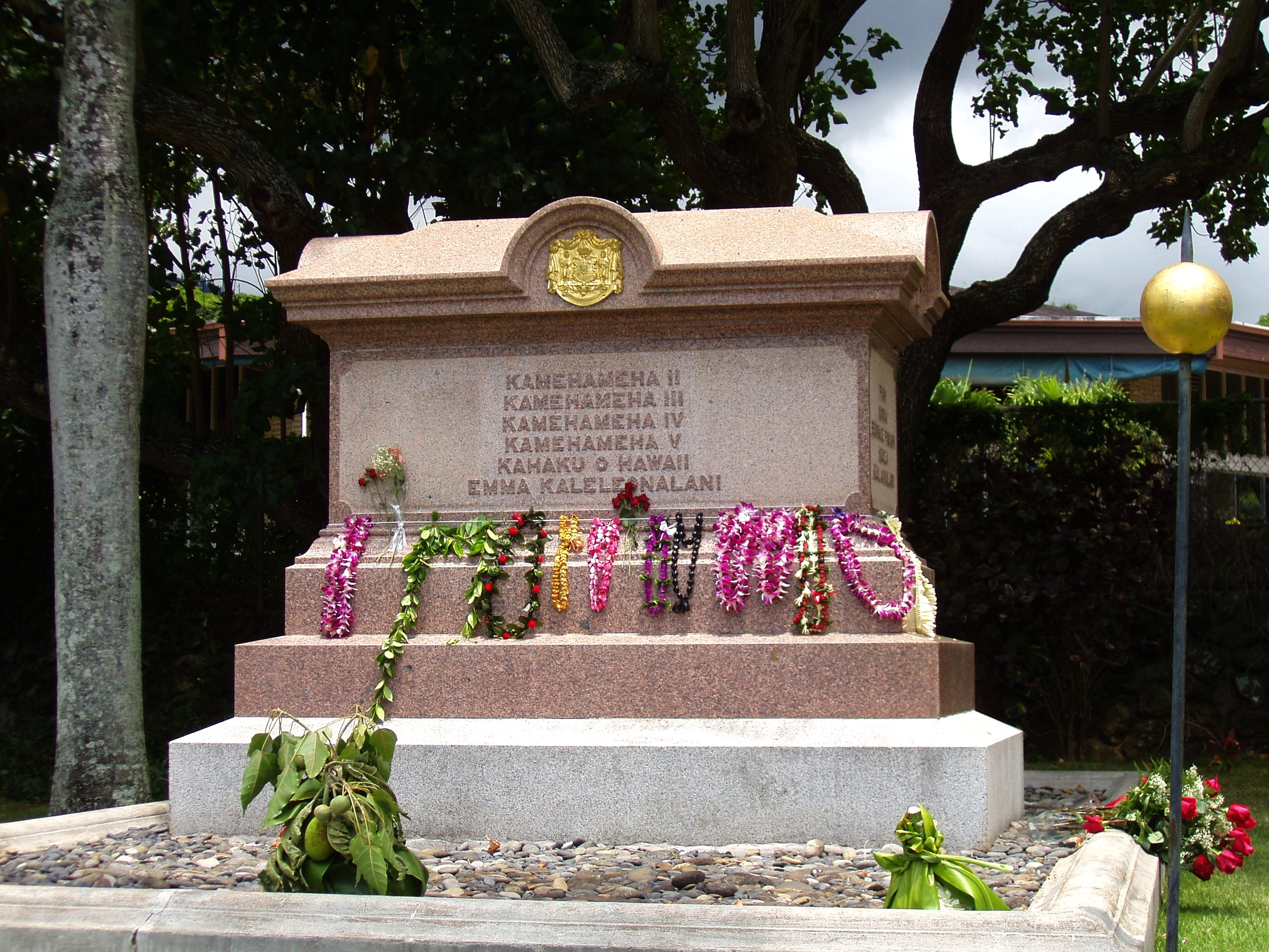 Kamehameha Dynasty Tomb - Royal Mausoleum, Honolulu, Hawaii, USA.